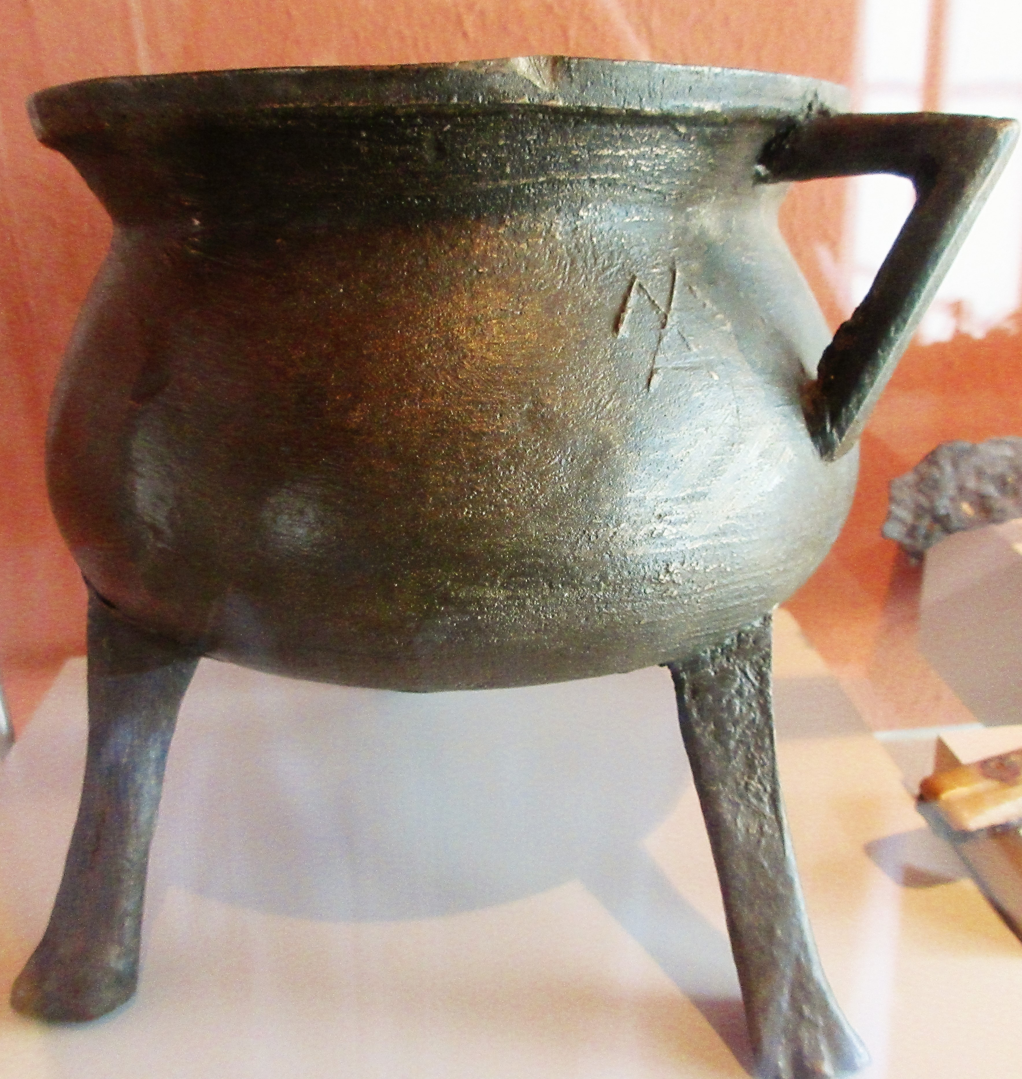 Bronzegrapen mit Gießermarke, 15. Jahrhundert, Stadtmuseum Güstrow